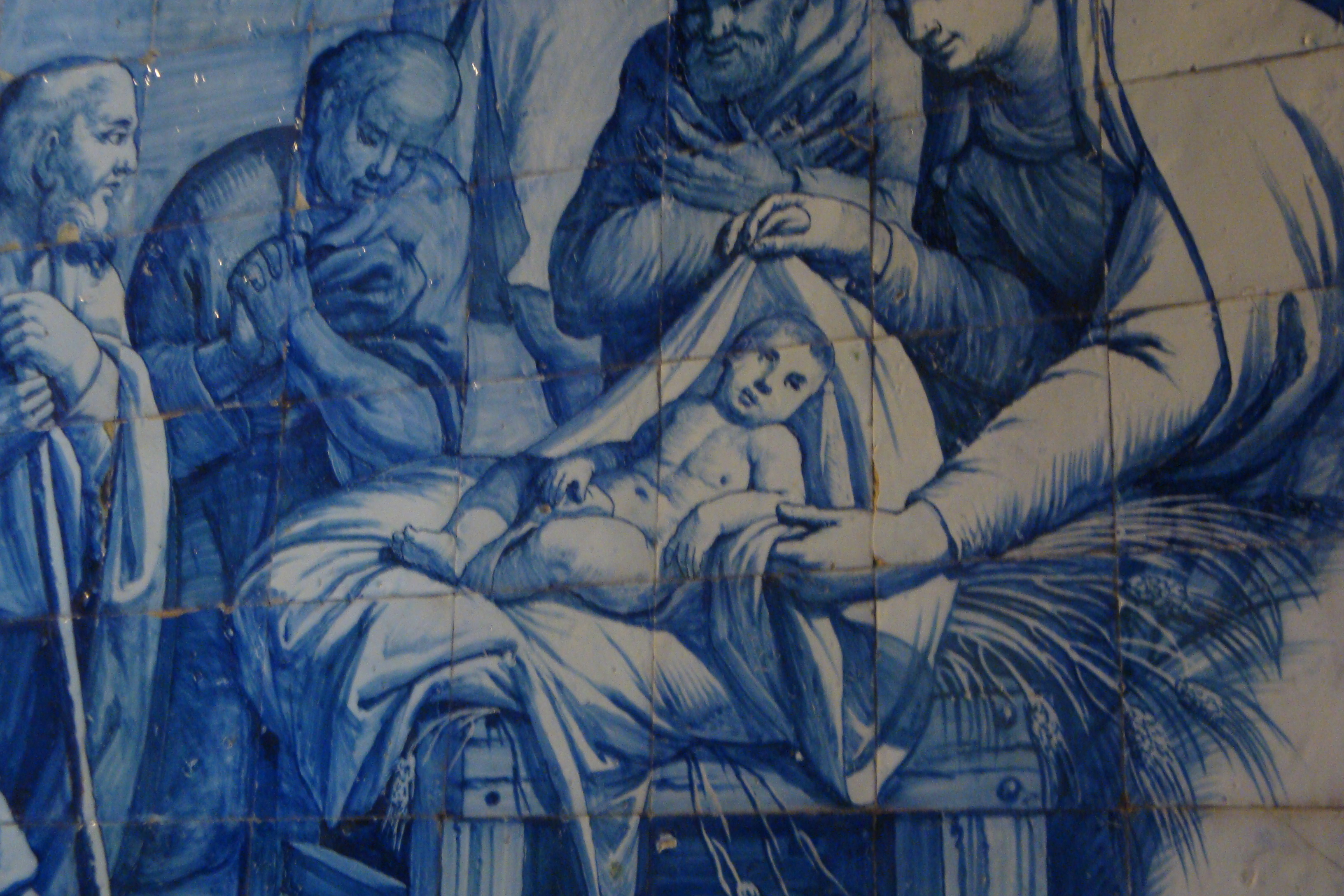 Azulejo no Santuário de Nossa Senhora dos Remédios, concelho de Peniche, distrito de Leiria, Portugal